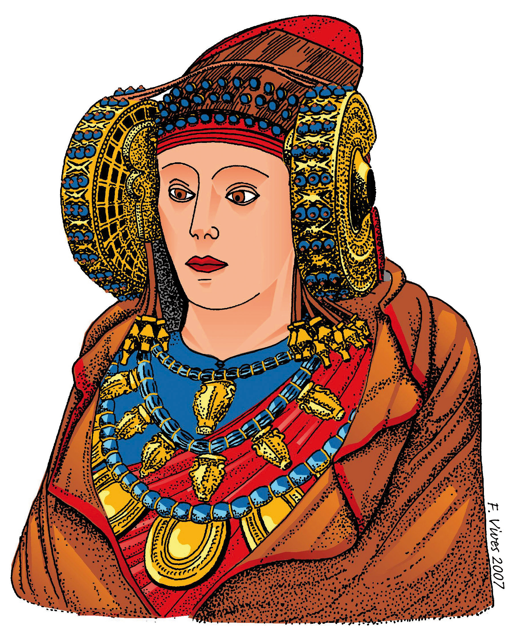 Interpretación de los colores de la Dama de Elche, por Francisco Vives, según los análisis realizados en 2005 previos a la cesión temporal a la ciudad de Elche.